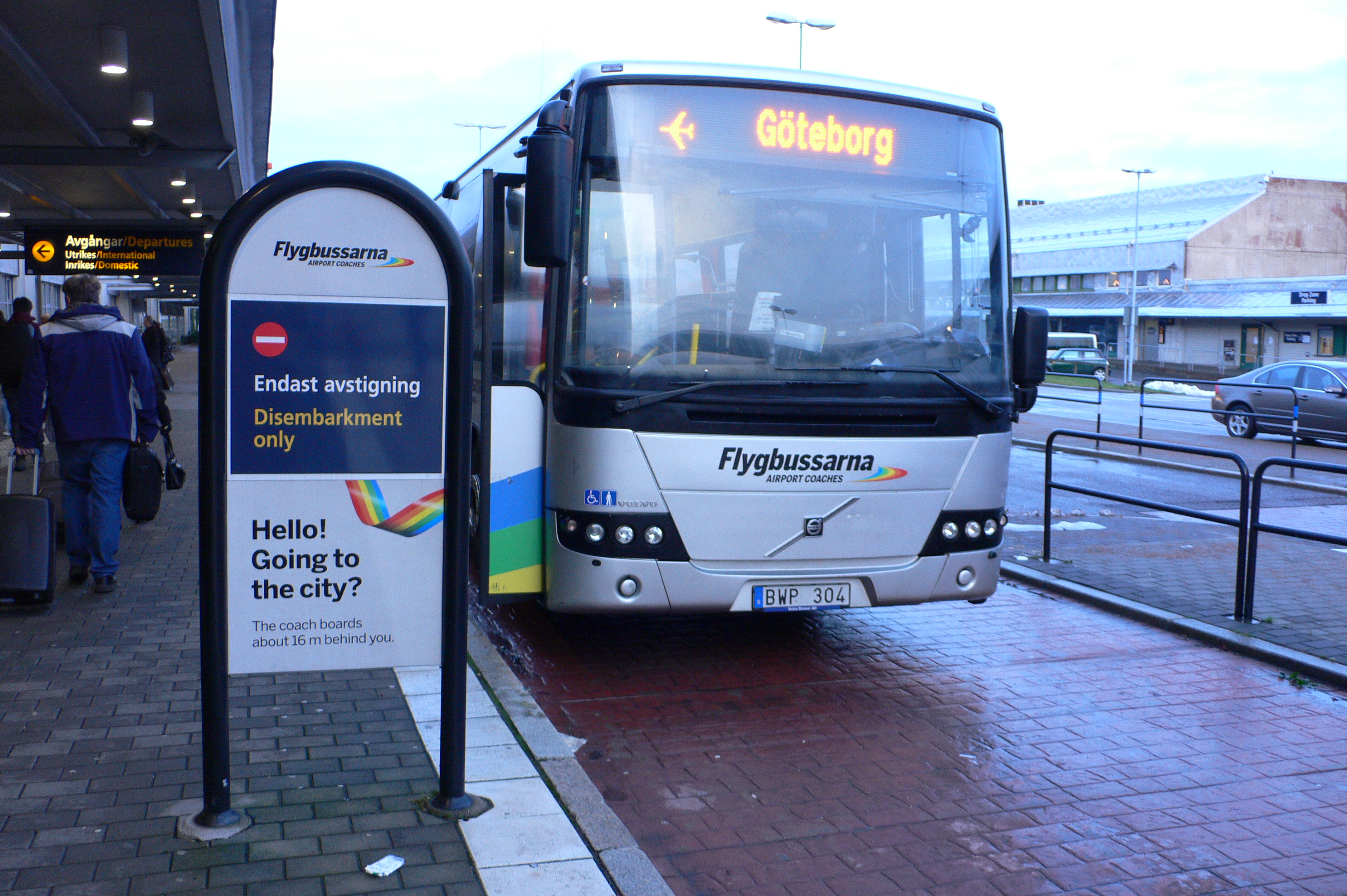 Volvo 8700 in Gothenburg